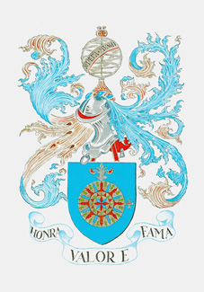 Brazão de Armas - Regimento Militar Português